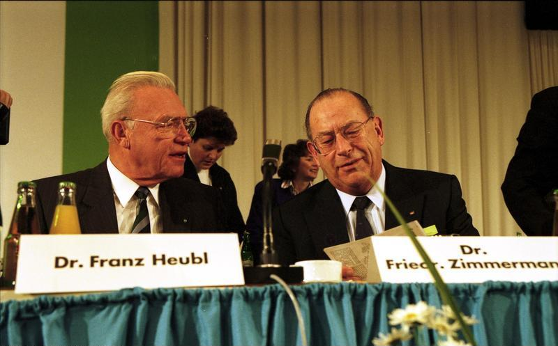 53. CSU-Parteitag in der Münchner Bayernhalle mit dem CSU-Vorsitzenden, Bundesminister für Finanzen Dr. Theodor Waigel, dem bayerischen Ministerpräsidenten Max Streibel, Bundesminister Hans Klein, und als Gast Bundeskanzler Helmut Kohl. 17.-18.11.1989